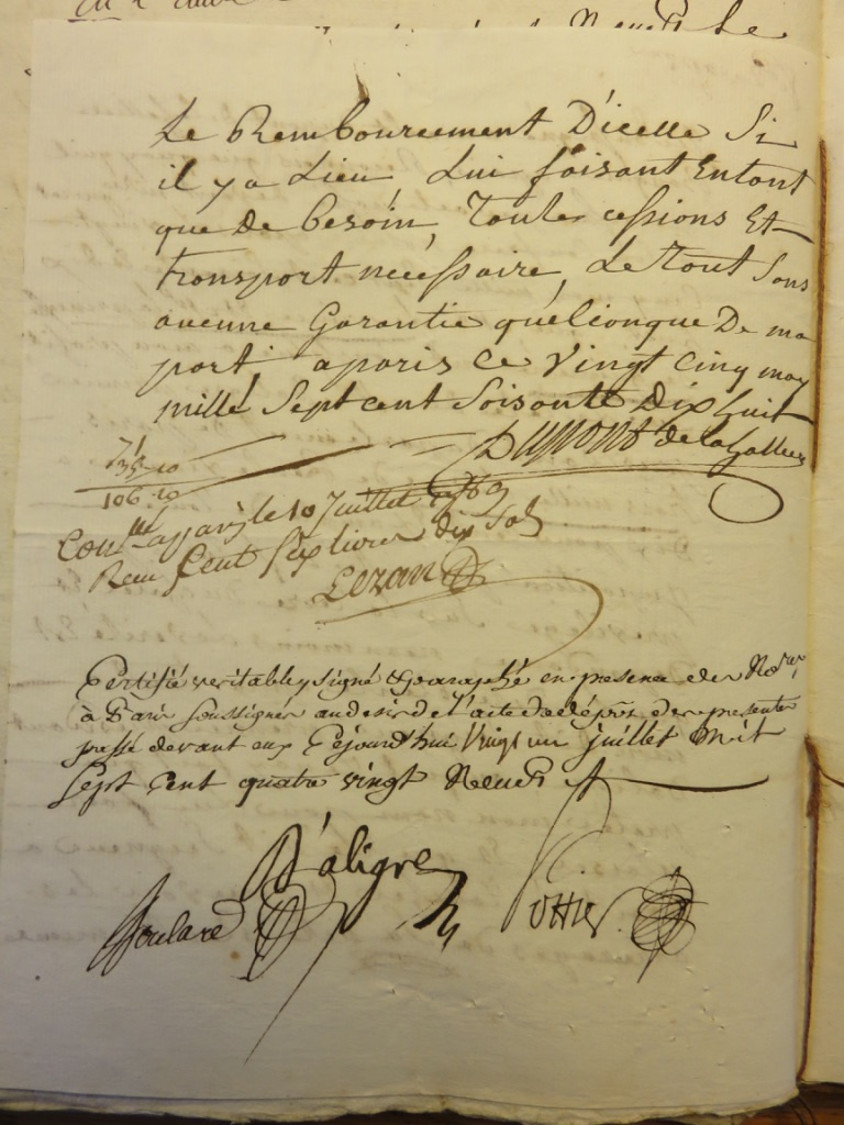 Le prince et la princesse de Guémené constituent une rente viagère au profit d'Armand Dupont en 1778